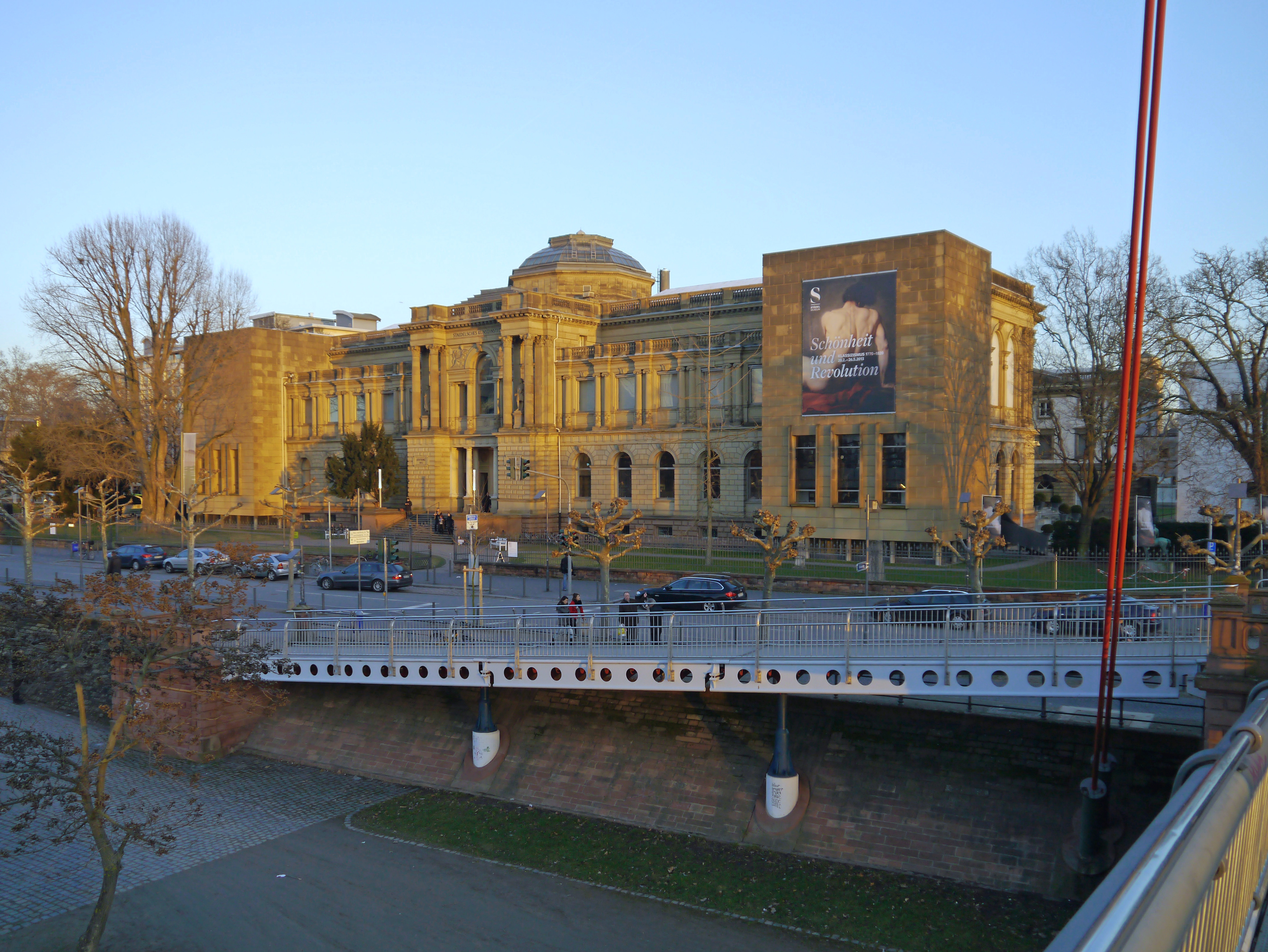 Das Städel in Frankfurt am Main.